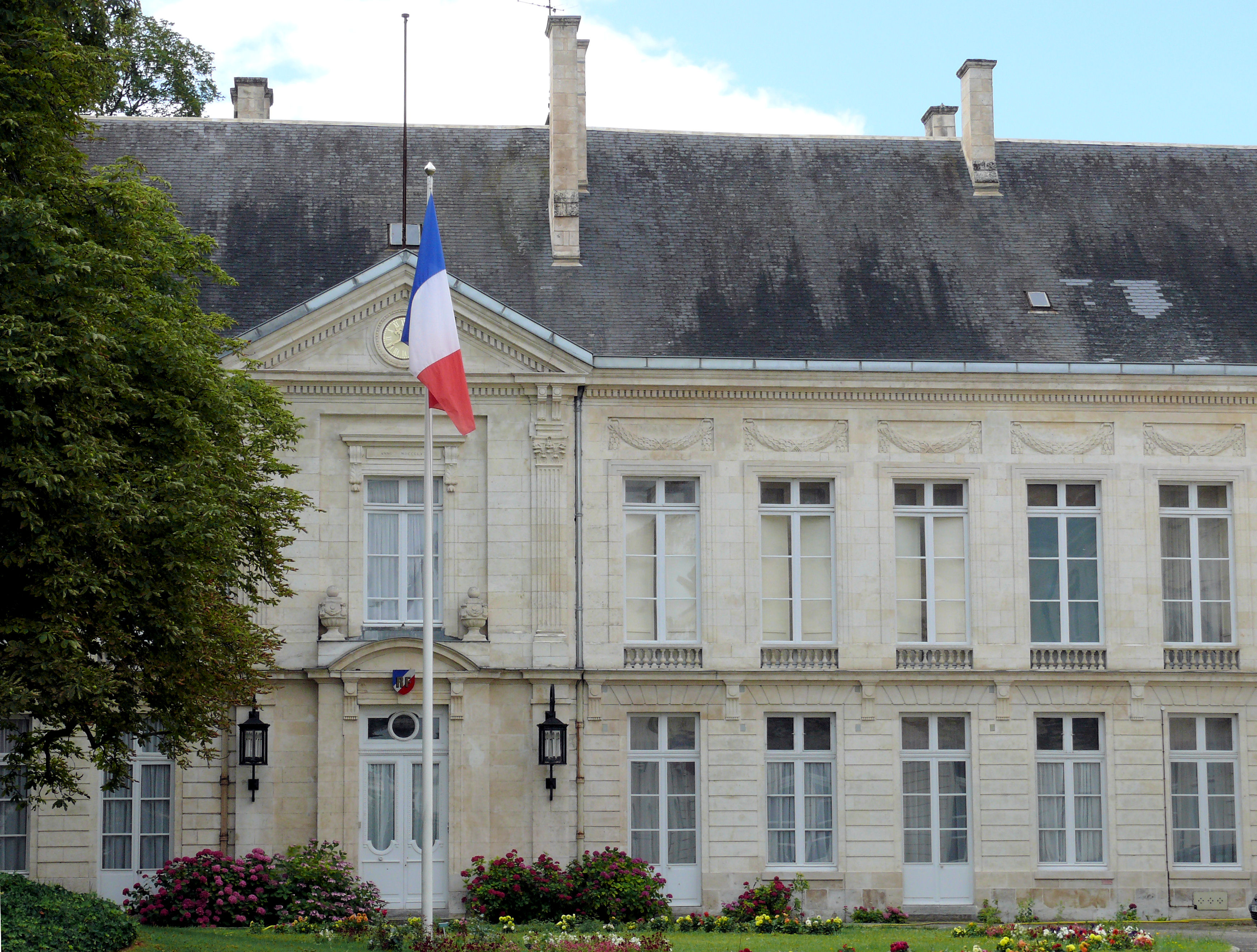 Bourges - Préfecture du Cher - Hôtel du préfet, place Marcel-Plaisant